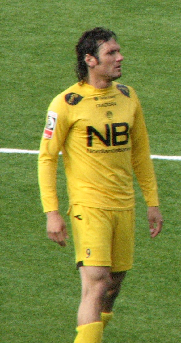 Thiago Martins (Glimt) under oppstillingen til BOdø/Glimt-Sogndal